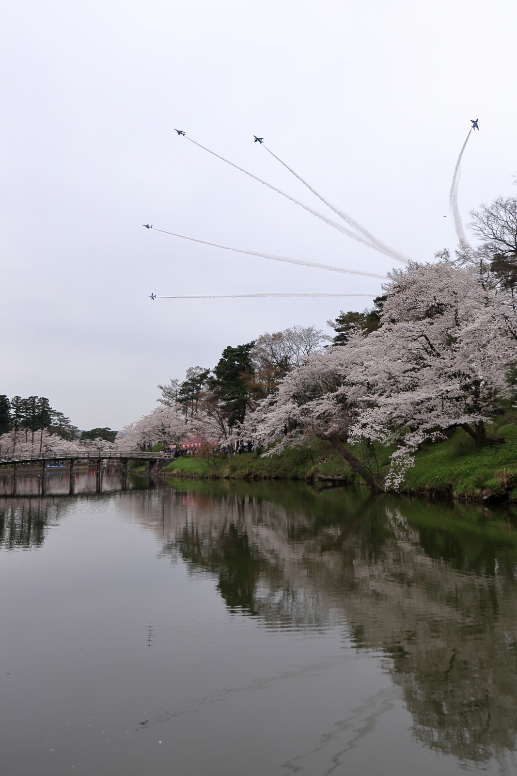 高田城百万人観桜会で行なわれた、航空自衛隊ブルーインパルスによる展示飛行。